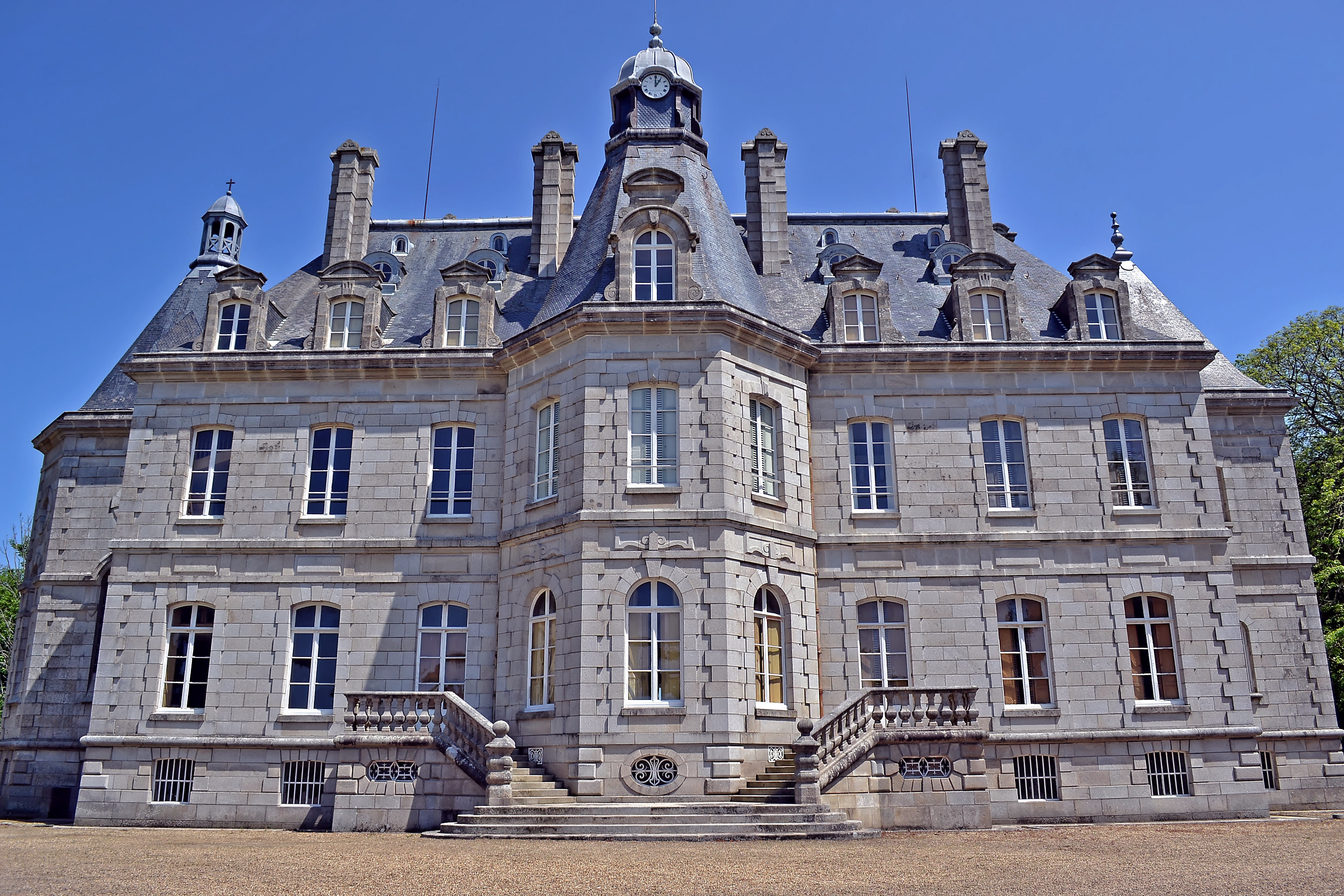 Château de Kernevez à Saint-Pol-de-Léon (Finistère).